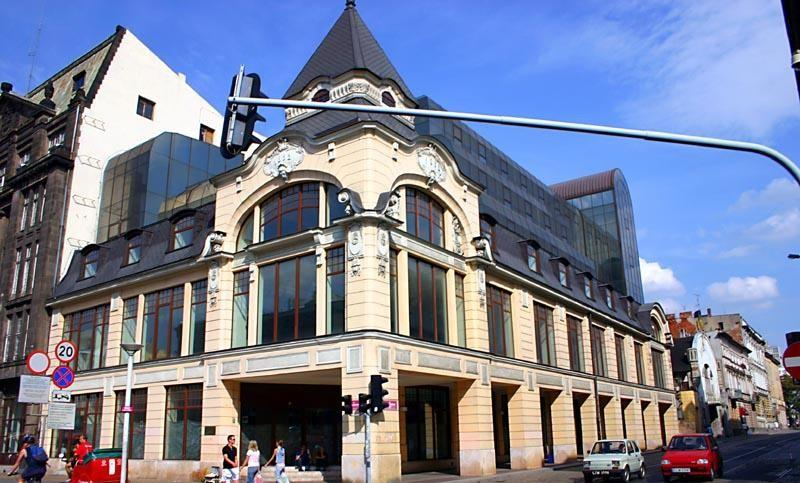 Ulica Piotrkowska, Łódź